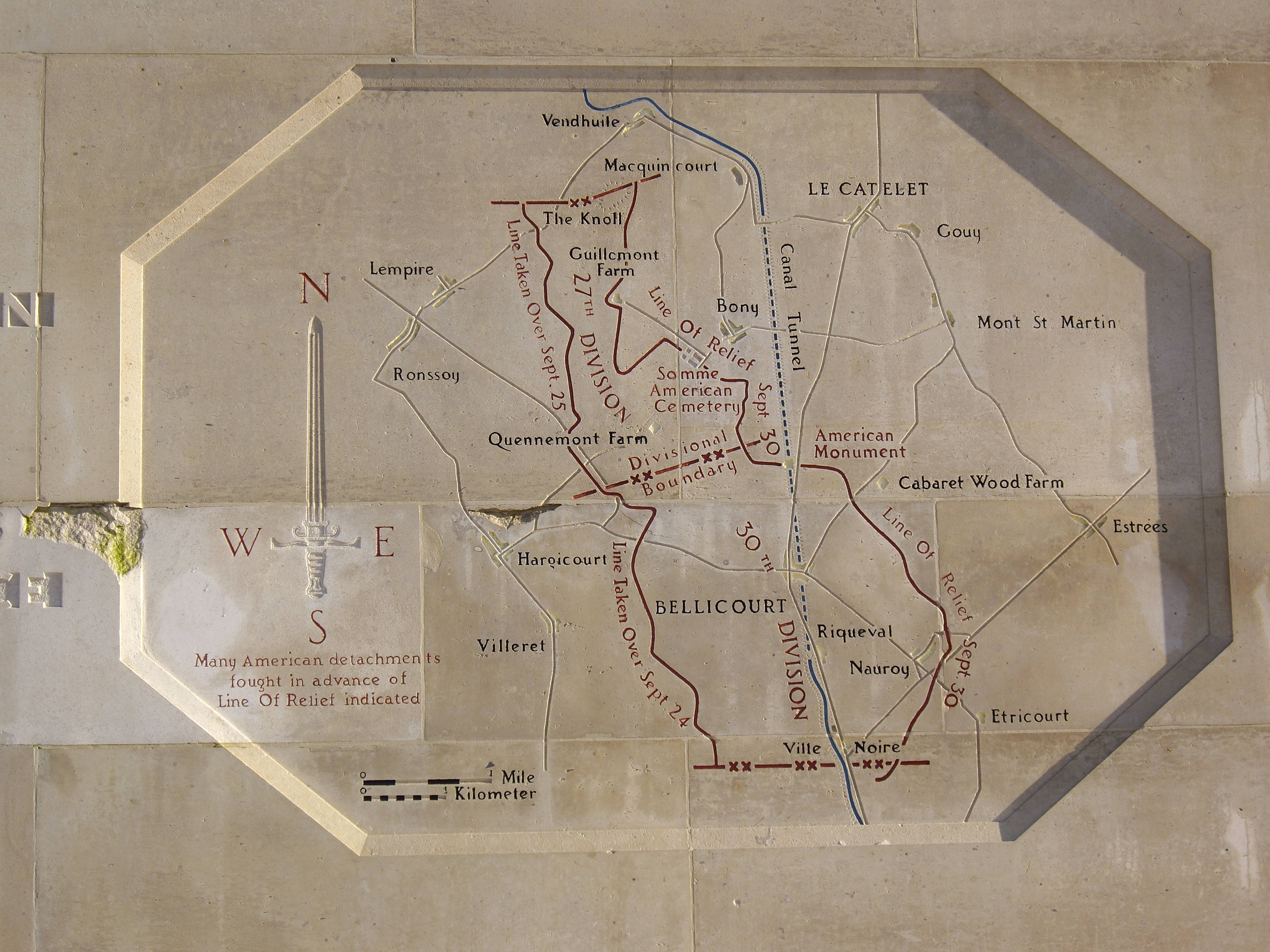 Description gravée dans la pierre du mémorial de l'offensive américaine victorieuse sur la ligne Hindenburg (septembre 1918).